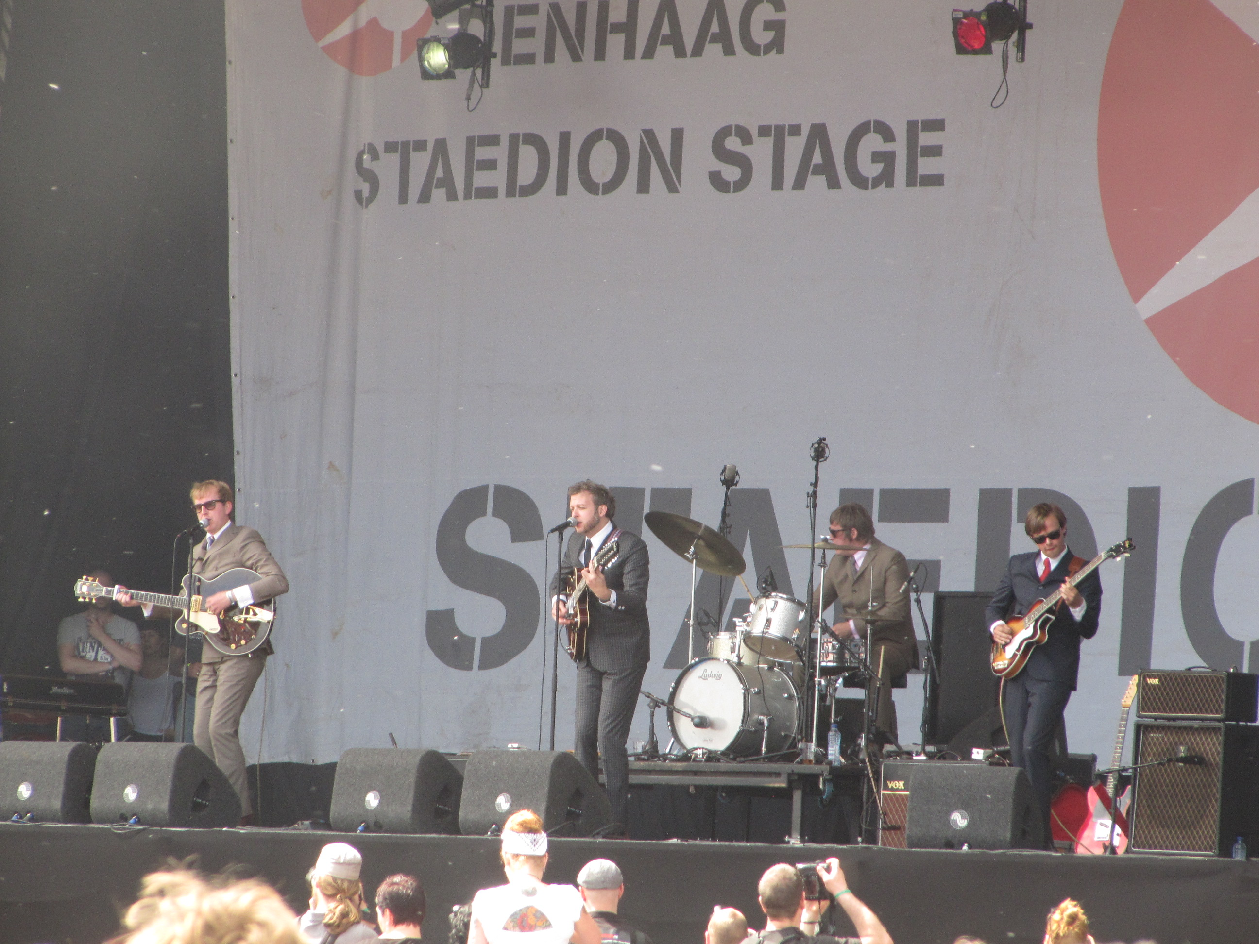 The Kik - Parkpop 2013